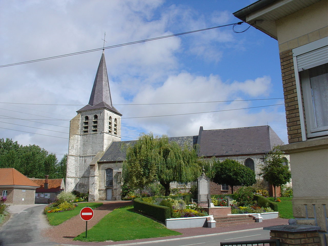 Église de Conchy-sur-Canche